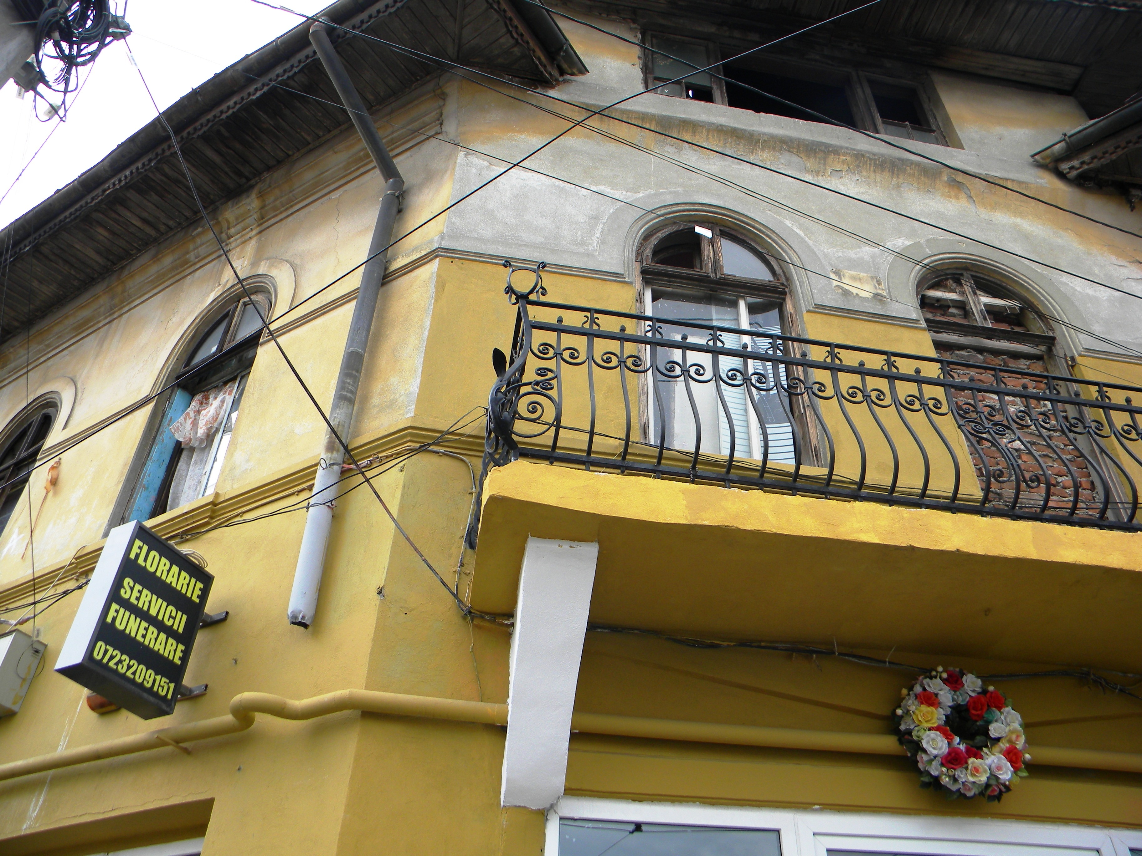 Bucuresti, Romania, Casa pe Str. Lizeanu nr. 39, sect. 2